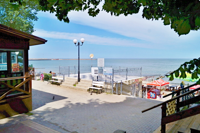 Променад